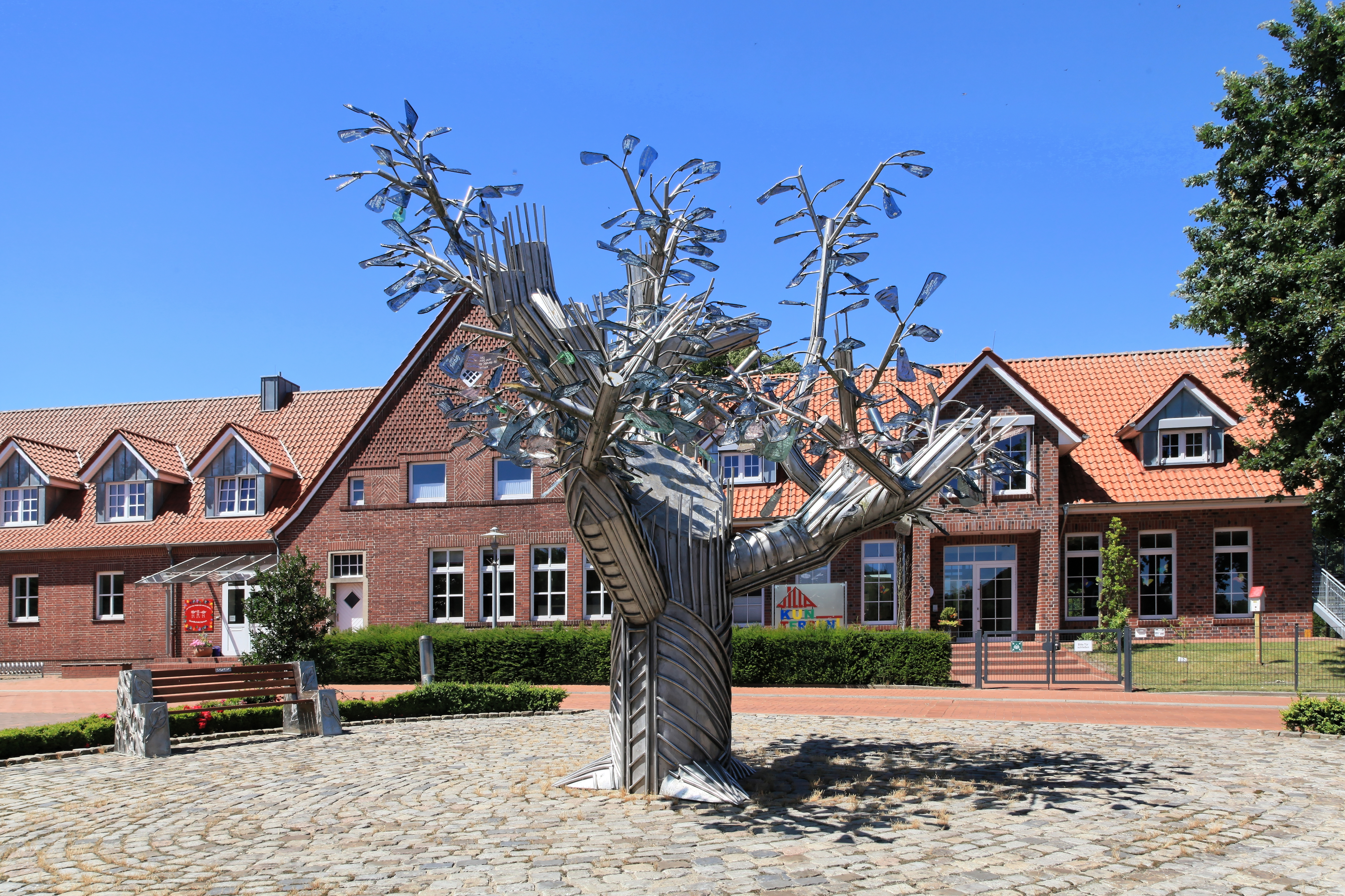 Bürgerbaum auf dem Kolpingplatz vor der Grundschule und der Kita Villa Kunterbunt in Dersum